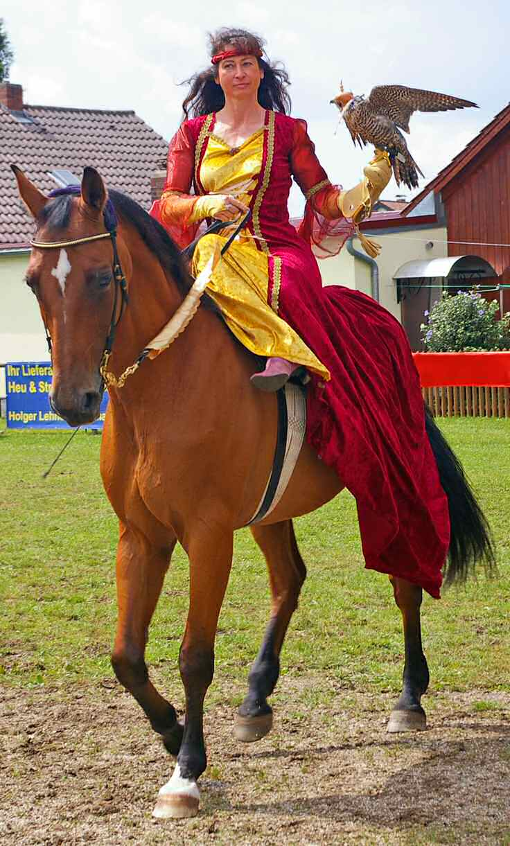 Sibylle Metz im Damensattel mit einem Falken beim Turnier in Moosham (Oberpfalz)